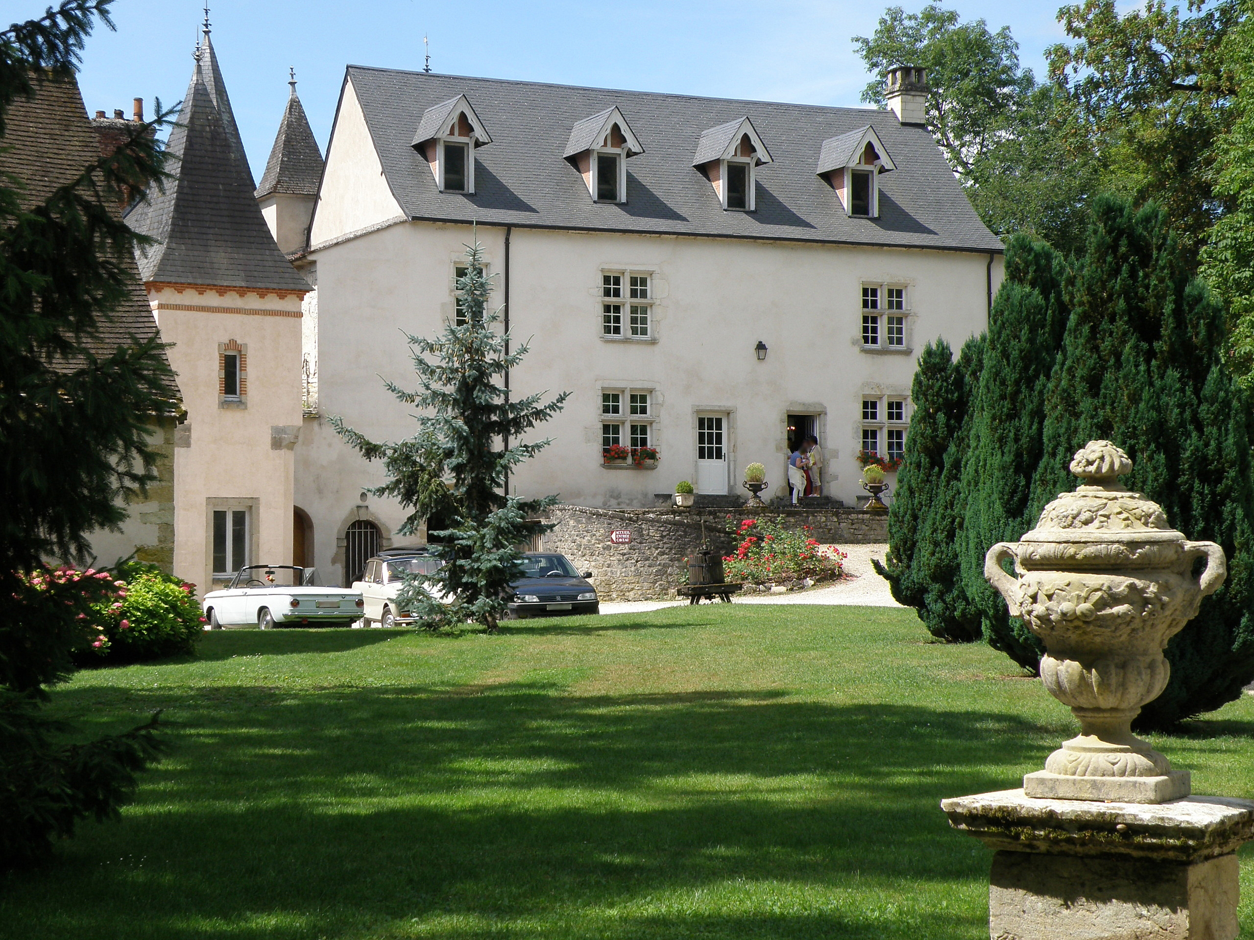 Melin, hameau de la comm. d'Auxey-Duresses (Côte-d'Or, Bourgogne, France). Château.